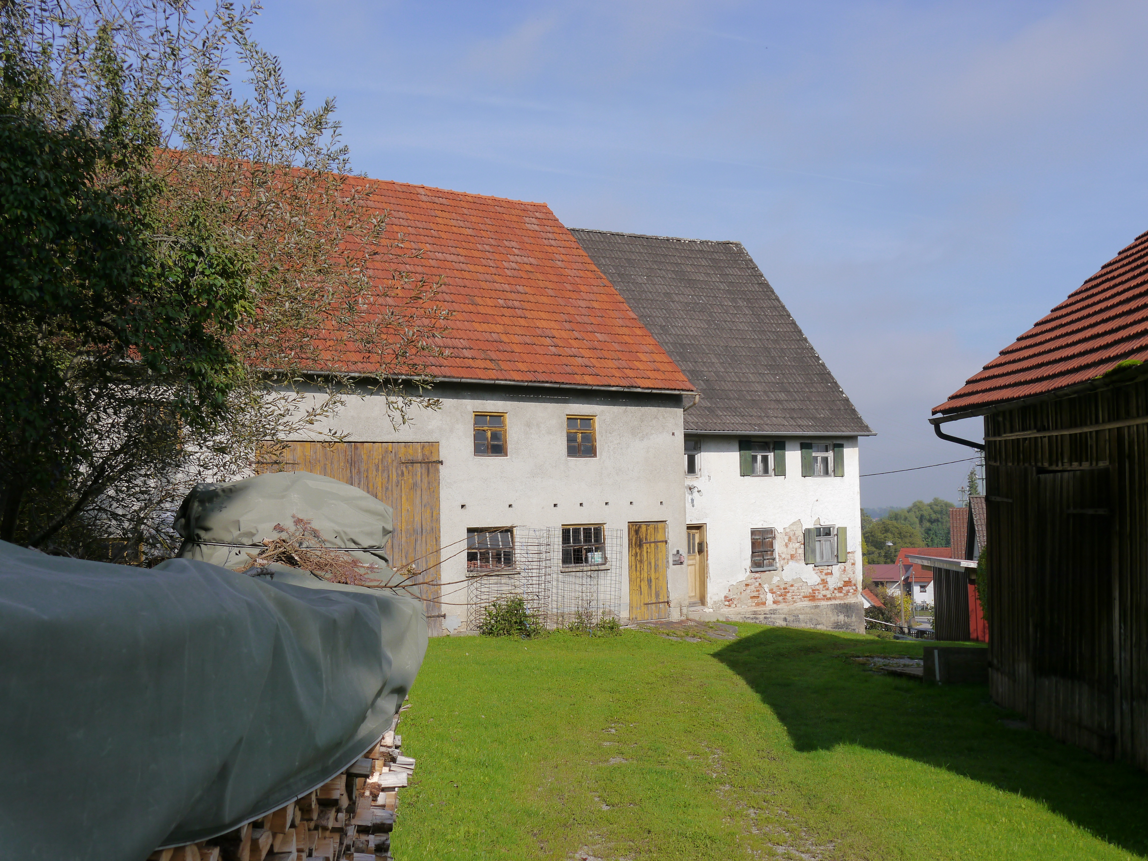 BauernhausThis is a photograph of an architectural monument.